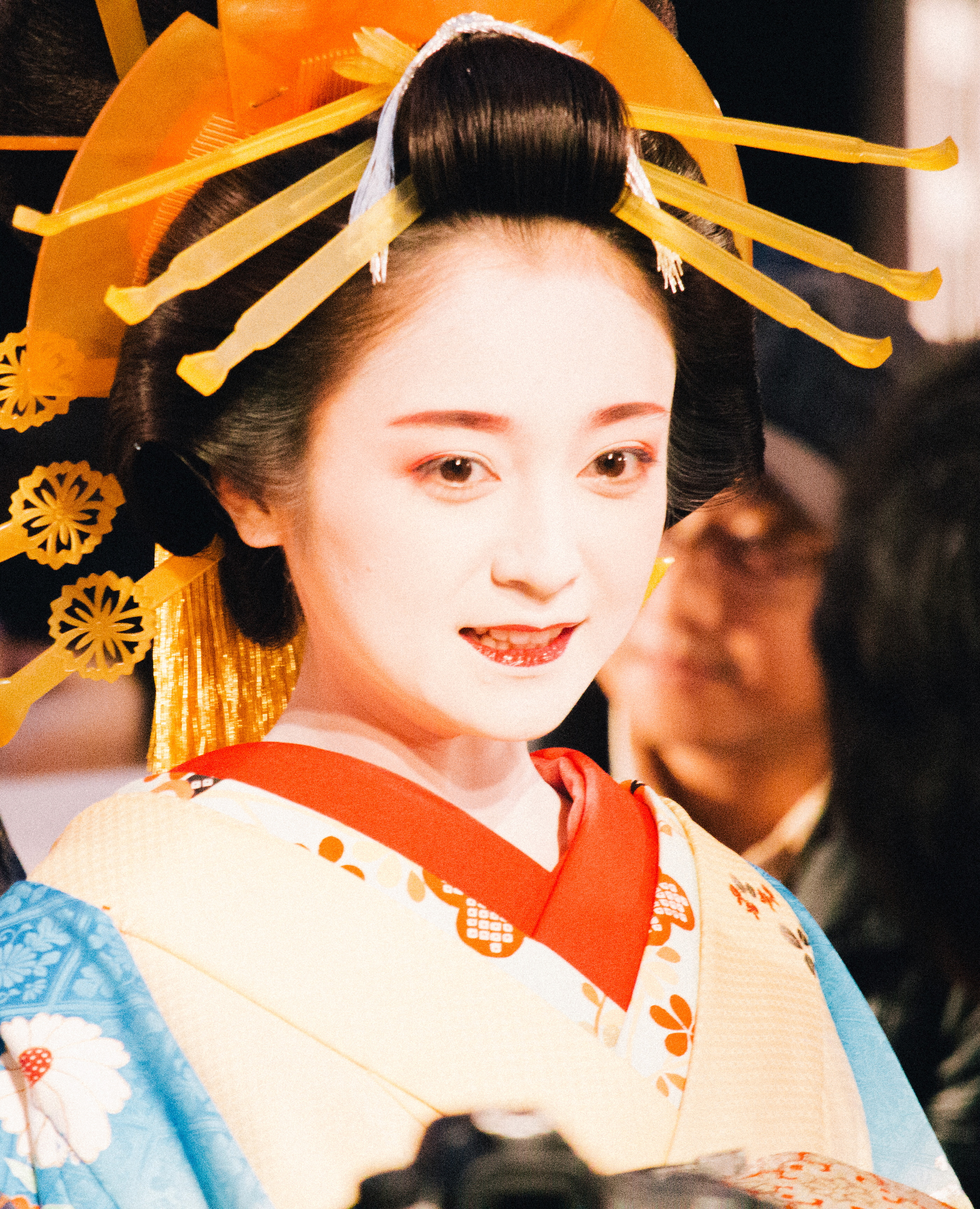 第27回 東京国際映画祭 安達祐実 (花宵道中)